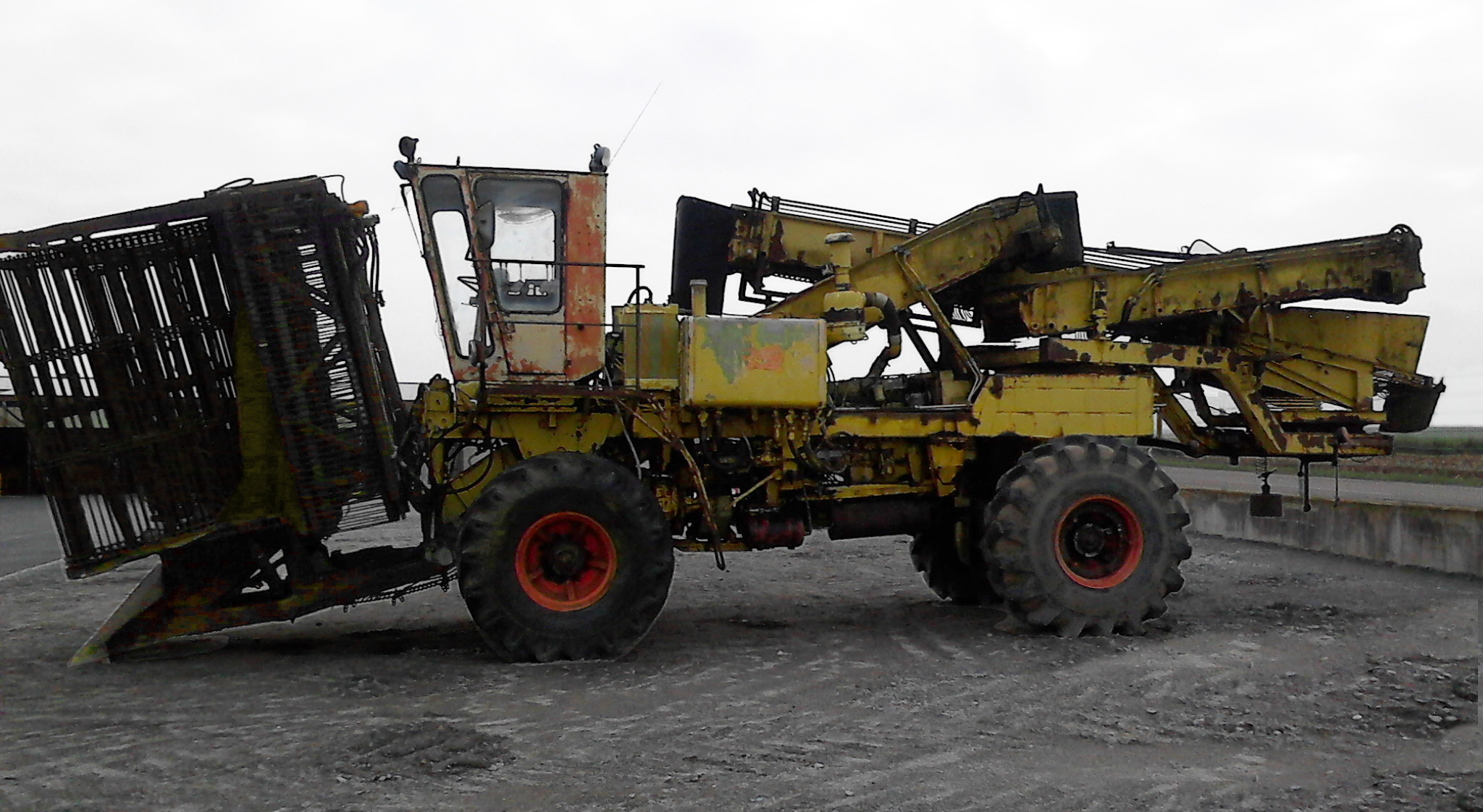 Fischer Maus Typ:OZVG1 Baujahr:1982 (Rübenreinigungslader, selbstfahrend)